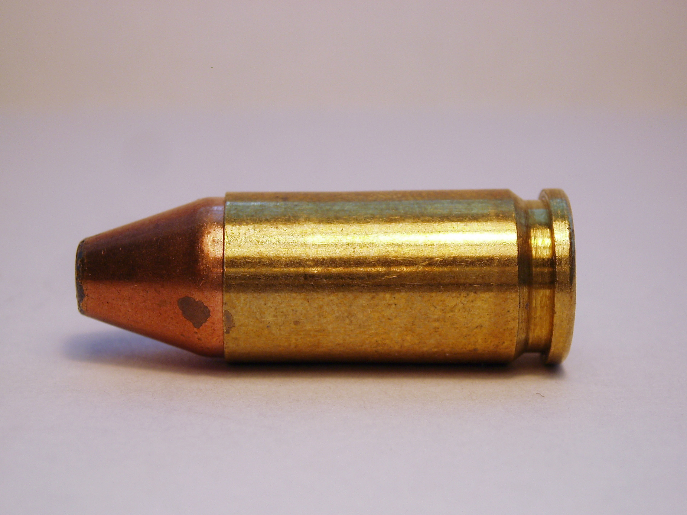 9 mm Luger pistol cartrdige. SP bullet. Manufacturer: Sellier & Bellot.